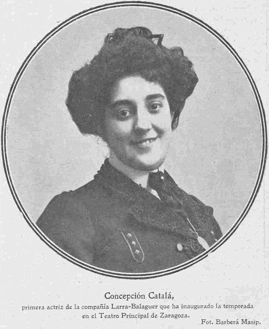 Concepción Catalá. fotografía de Barberá Masip.